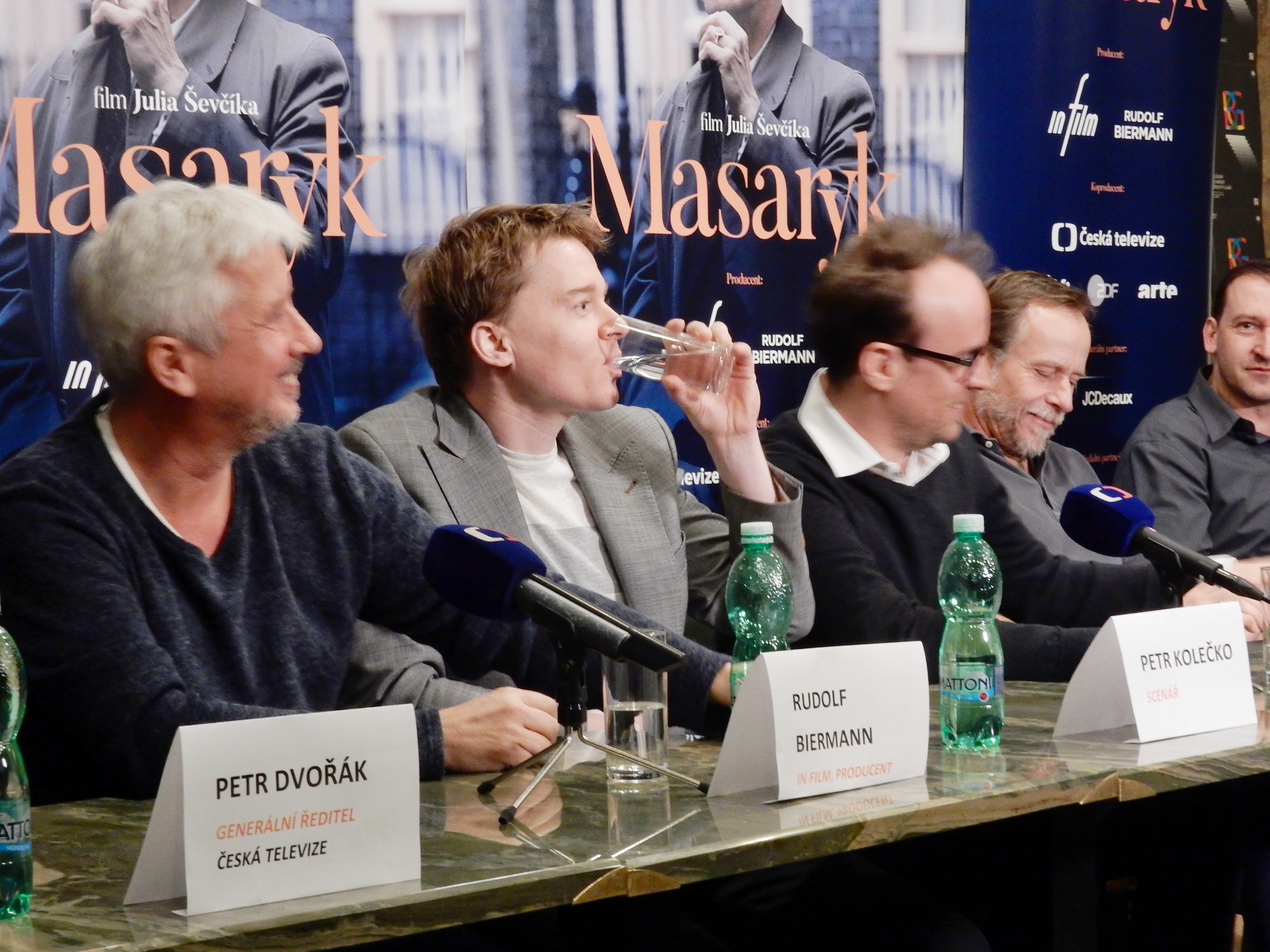 Fotka z novinářské konference 28.2.2017. Autor: Blanka Borová (Karolína Černá) pro Kritiky.cz